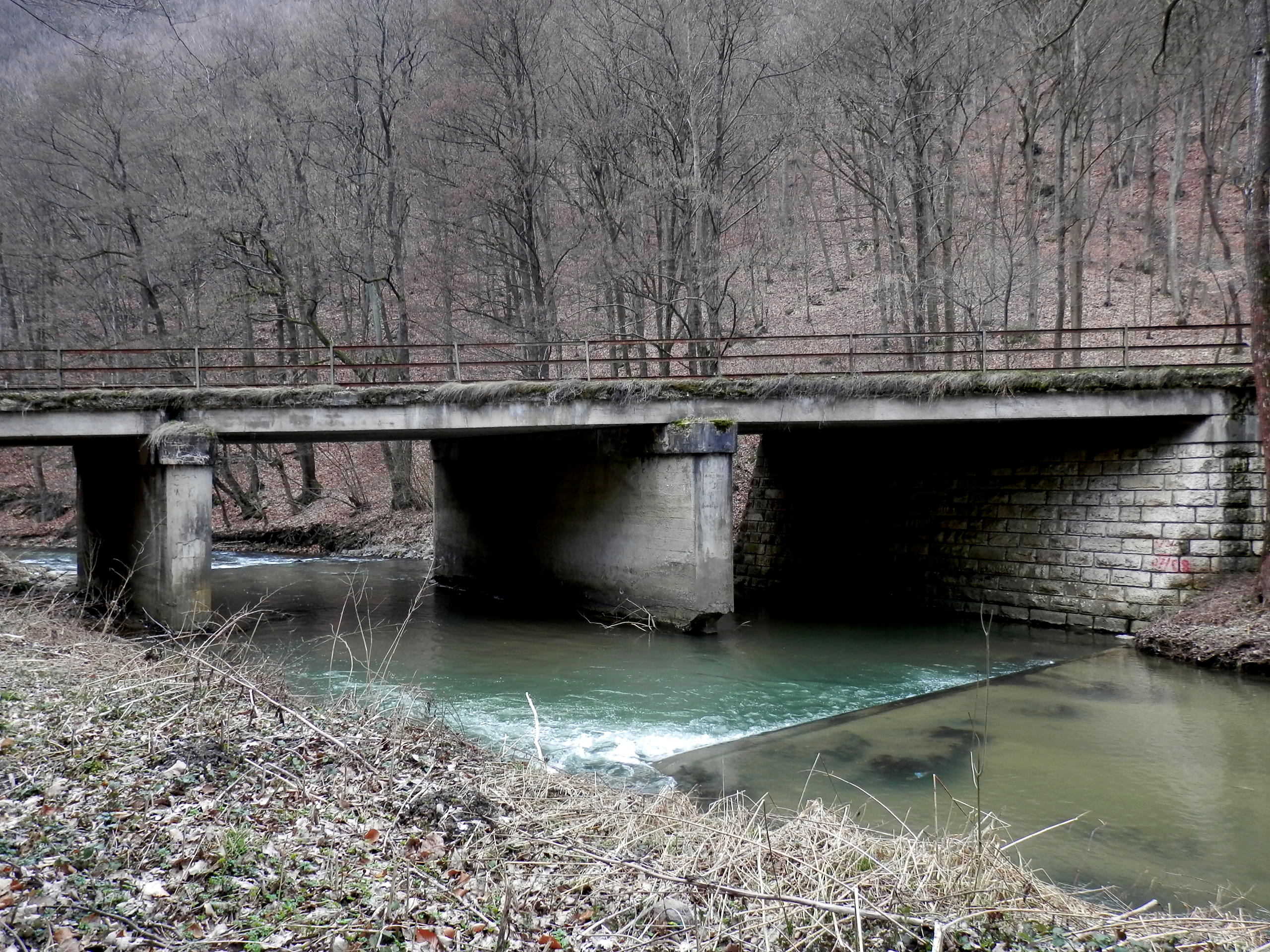 Most cez rieku Svinku. Kataster obce Obišovce, okres Košice okolie.